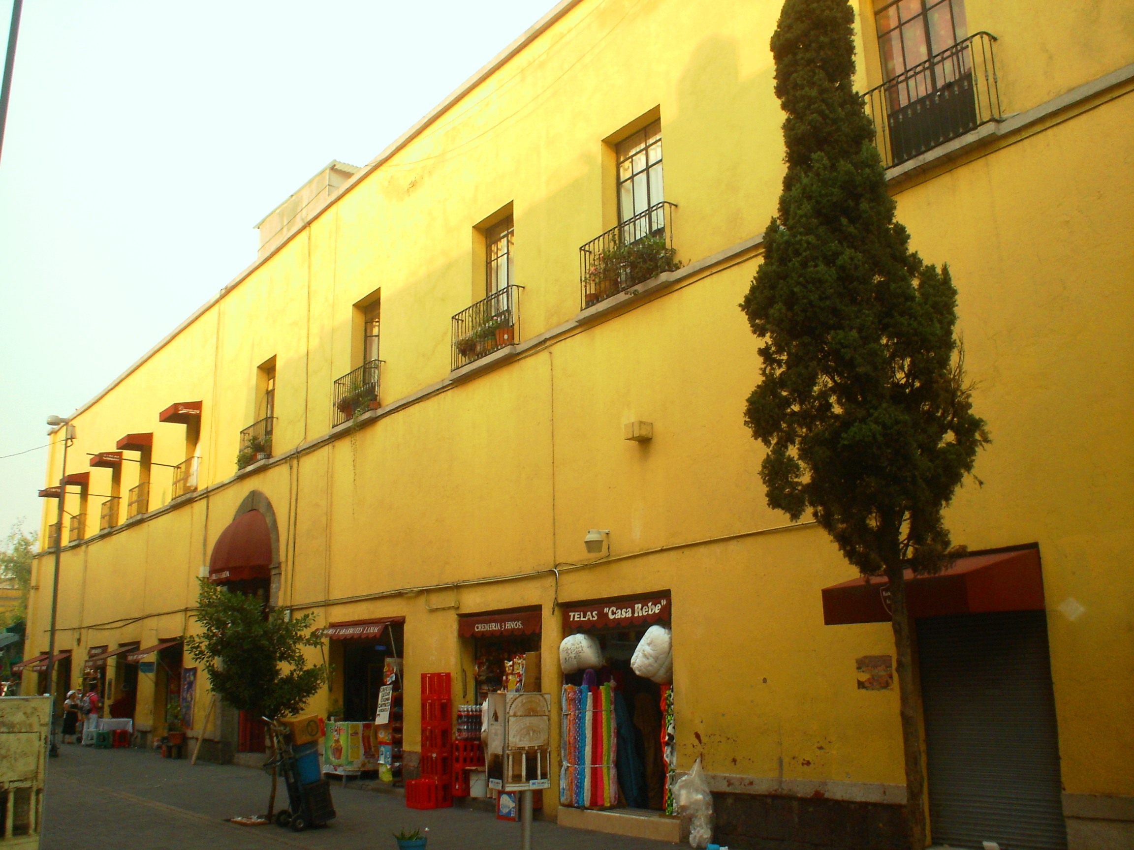 Noviciado del exconvento de la merced ciudad de mexico